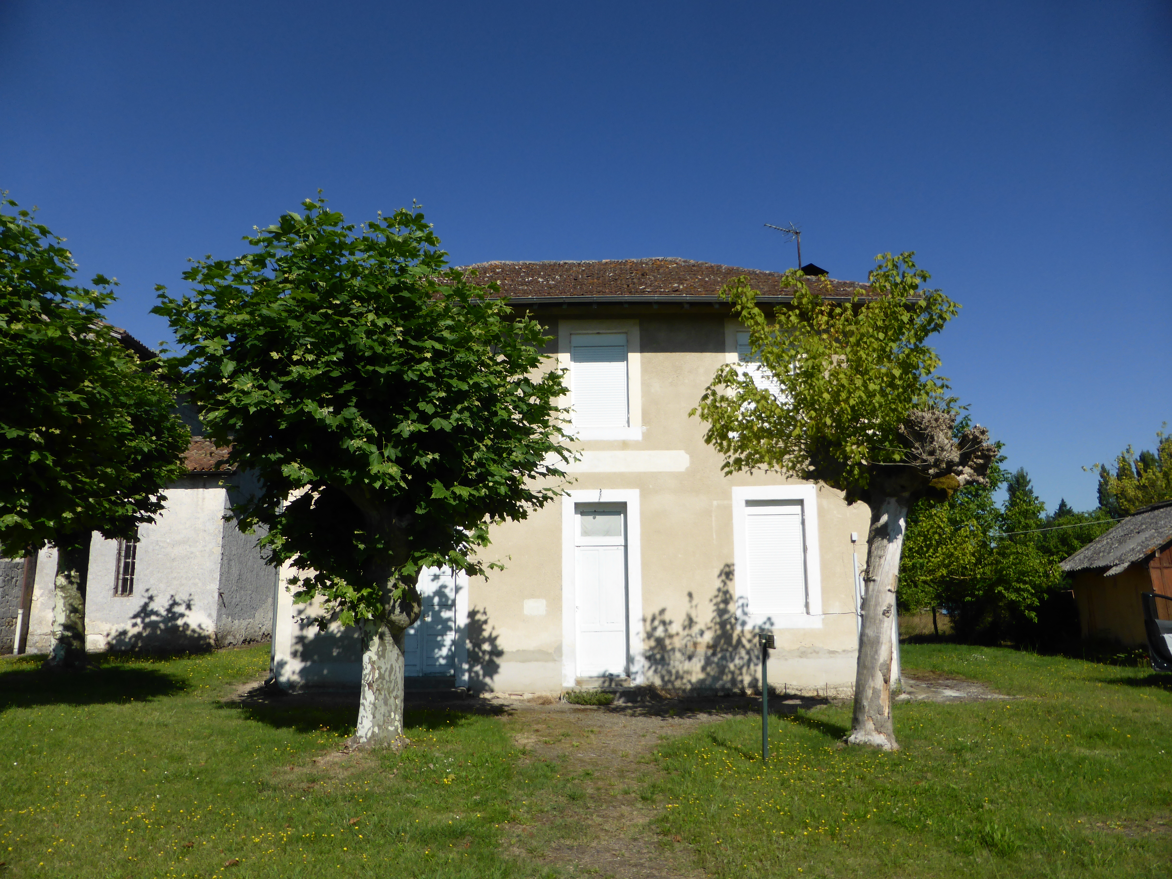 Ancienne poste de Herré, dans les Landes.